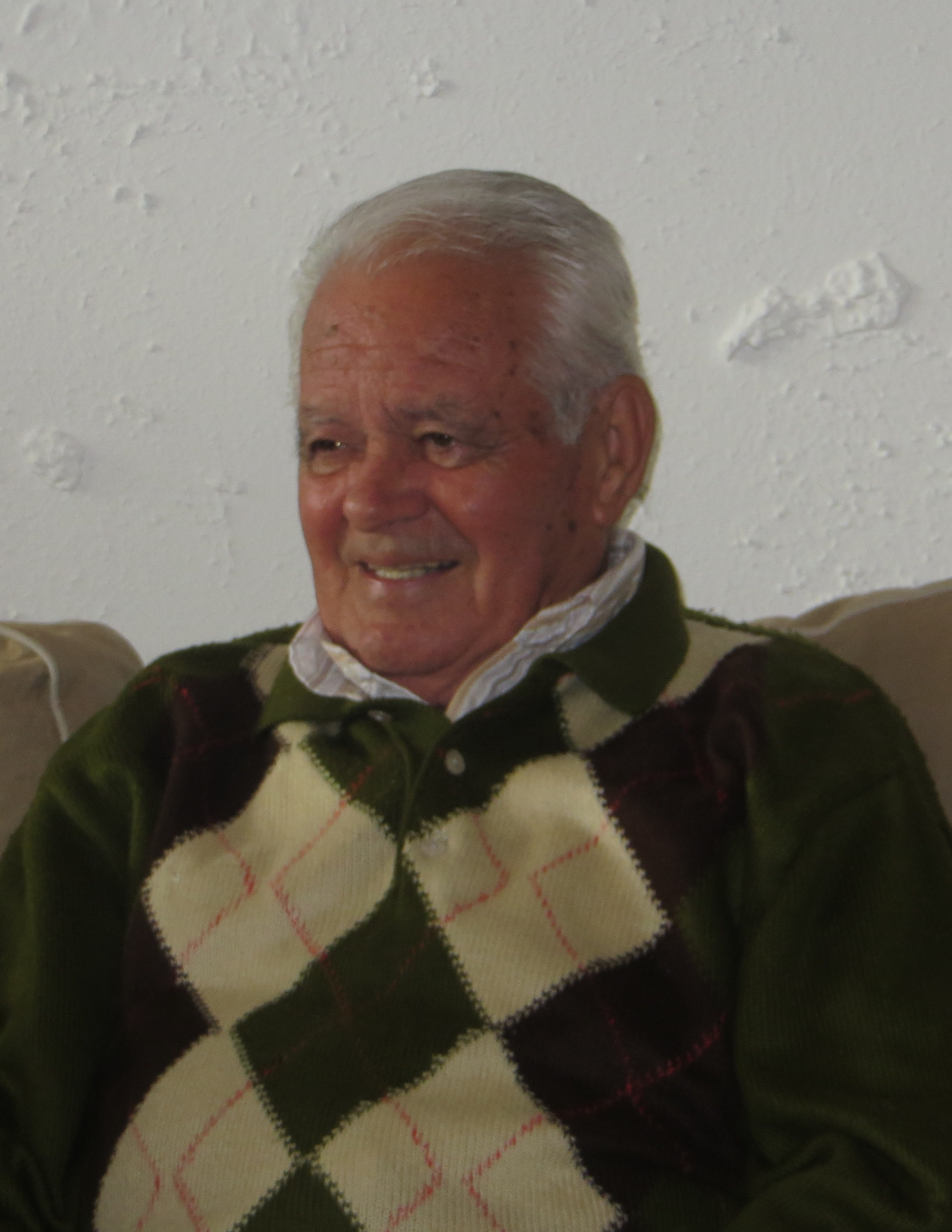 Branko Latas